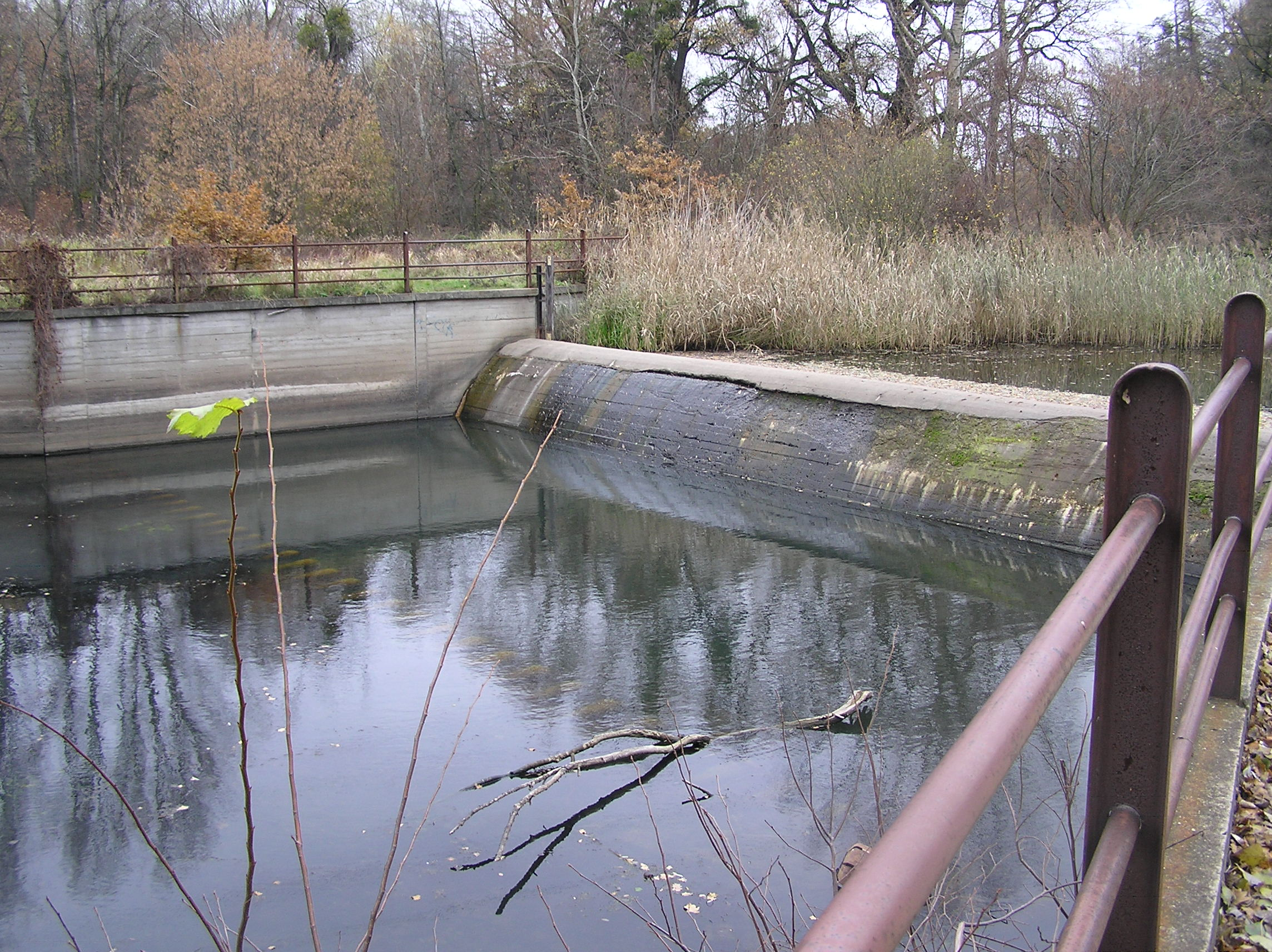 Wrocław, Park Wschodni, jaz stały kierujący przepływem do Dolnej Oławy